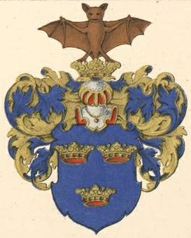 Howeni suguvõsa aadli- ja parunivapp